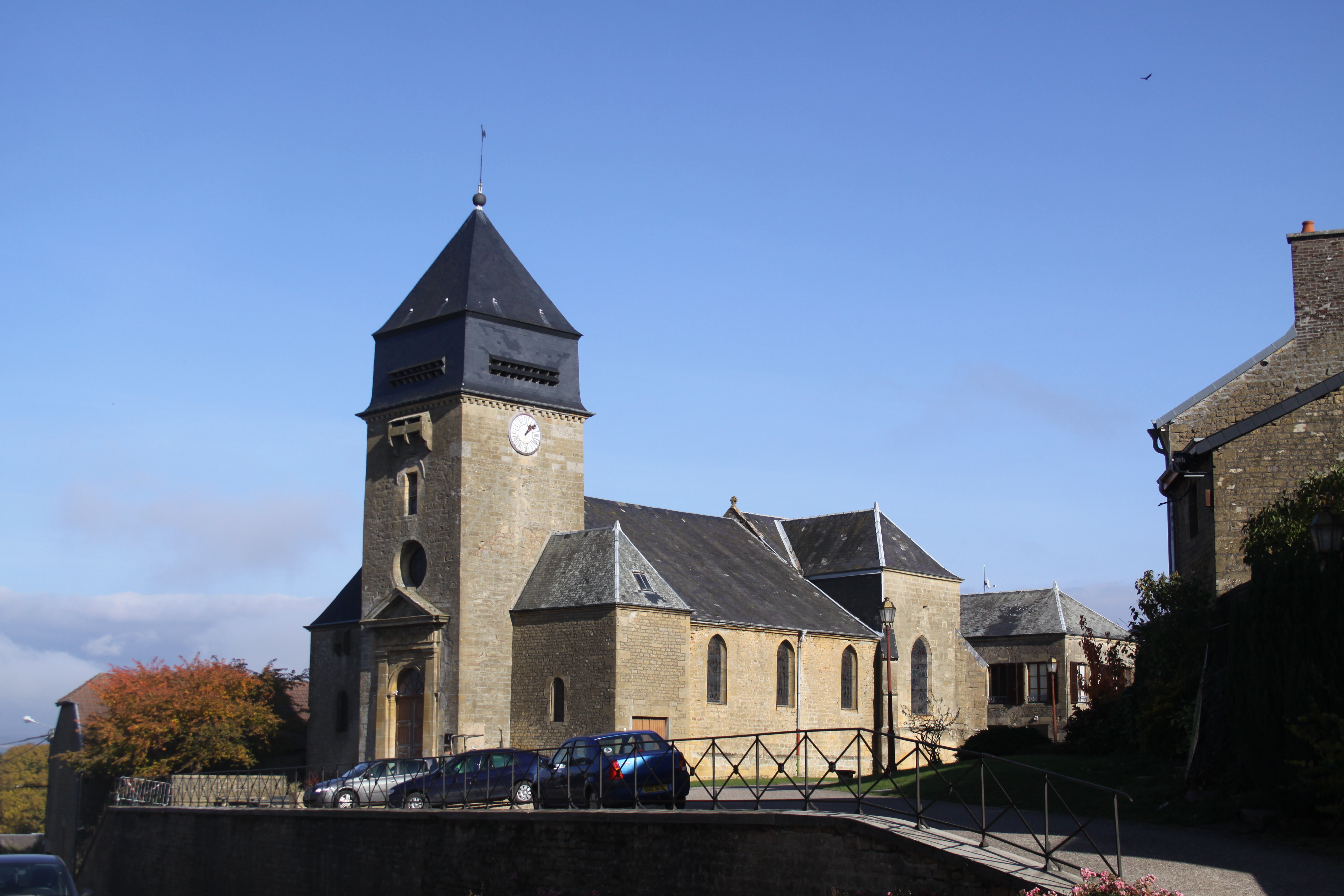 Église fortifiée Saint-Rémi de Remilly-Aillicourt (Ardennes, France) .